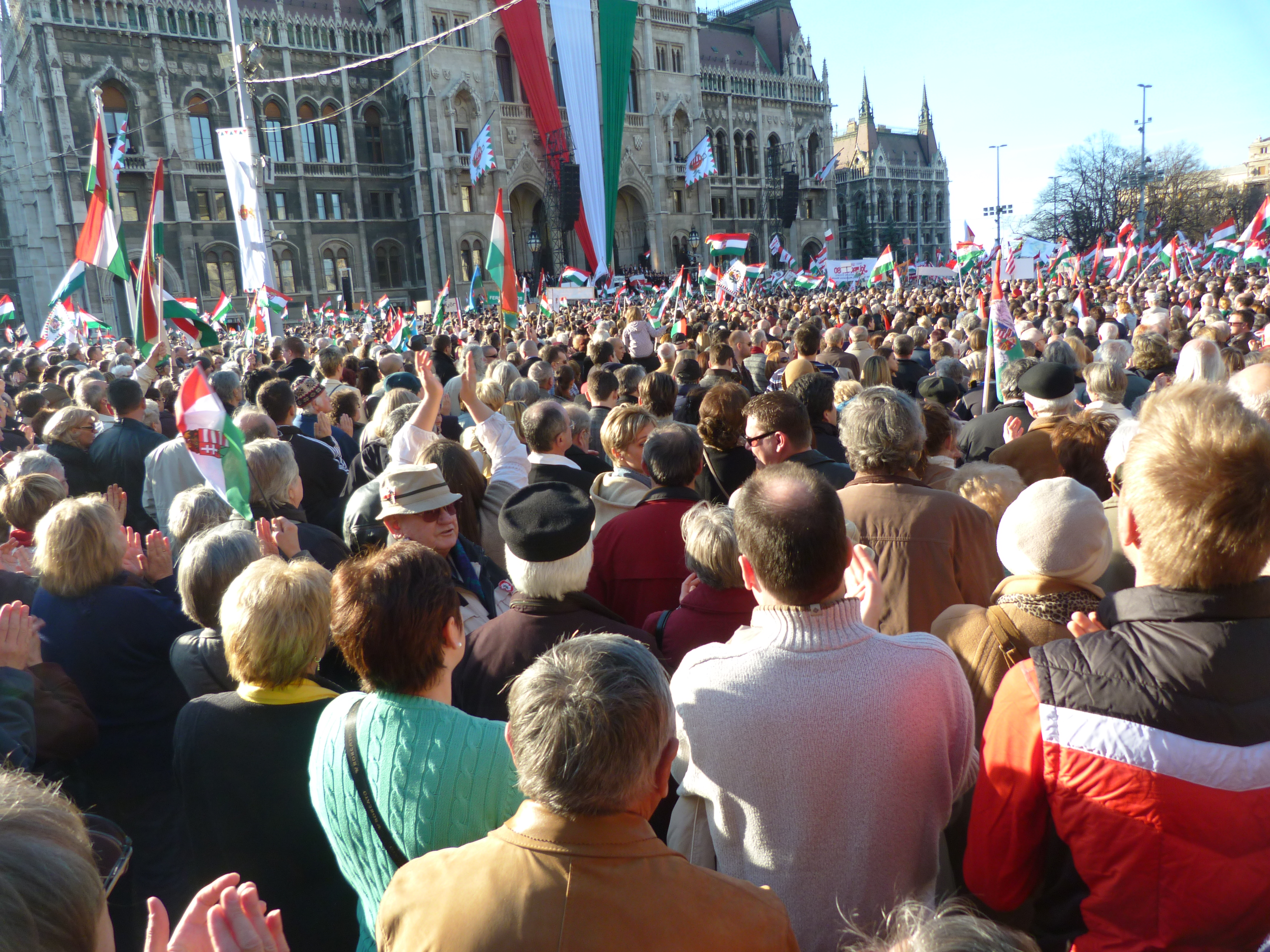 Live on the 15th of march, 2012. Budapest Kossuth tér. Orbán Viktor, prime minister of Hungary: “We won’t be a colony,” Orban told the crowd at Kossuth Square outside the parliament building, his 27-minute speech often interrupted by cheers. “Hungarians won’t live according to the commands of foreign powers, they wont give up their independence or their freedom.” Orban said Hungary would defend its new constitution, “We write our constitution ourselves,” Orban said. “We don’t want unrequested assistance from foreigners who want to guide our hands.” Published under Creative Commons in the Metapolisz DVD line. A felvételek 2012. március 15 –én készültek Budapesten, a Kossuth téren. Szájer József, Orbán Viktor beszéde. A felvételek megjelentek Creative Commons alatt a Metapolisz DVD sorozatban. A BS file, illetve az ahhoz tartozó adatfile tartalma a portálon Creative Commons alatt megjelent anyag. Szerzője és impresszuma az adatfile szerinti. Tartalma szerzőjének illetve a portál előírásainak megfelelően másolható. Közzétéve Creative Commons alatt a Metapolisz DVD sorozatban. Források: Az elmúlt tíz év is benne van a kohéziós pénzek befagyasztásában Hungarian PM Viktor Orban denounces EU's 'colonialism' Hungary’s prime minister accuses EU of colonialist behavior, tells bloc to stop meddling Orbán compares EU to Soviet Union Orbán Viktor: Brüsszel nem Moszkva Mindenből kihagyta a kormány az MNB-t By Kester Eddy in Budapest